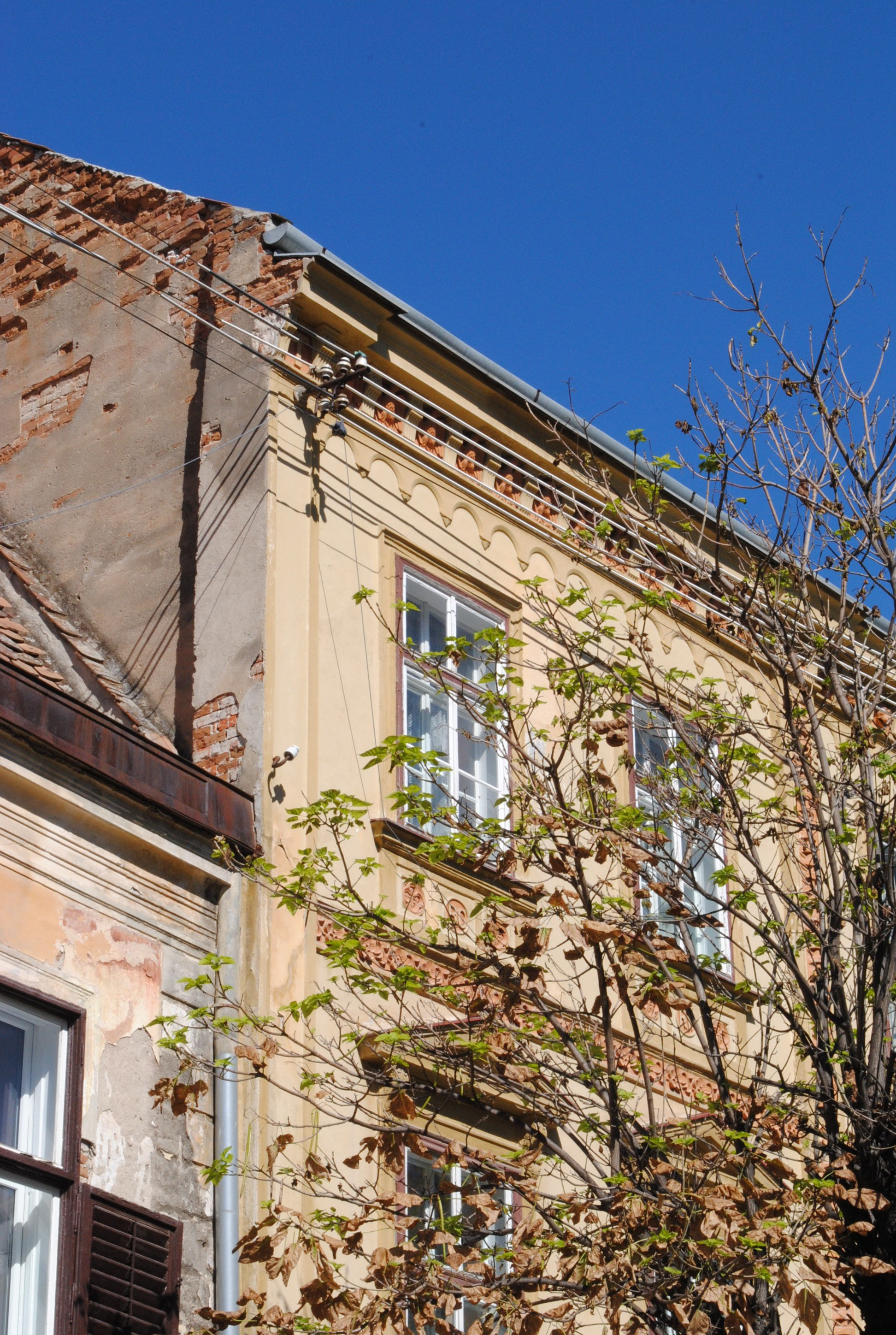 Casă (înglobează fragmente medievale și de fortificații incinta III), sec. XIV - XVI (fragmente),1870 - 1880